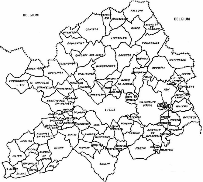 Carte des communes de la LMCU, tirée du wikipédia anglophone. :en:User:Hardouin